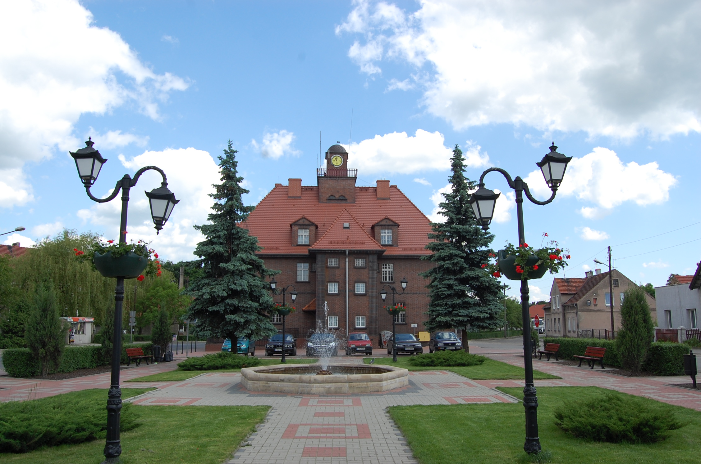 Plac obok ratusza z fontanną w Małomicach